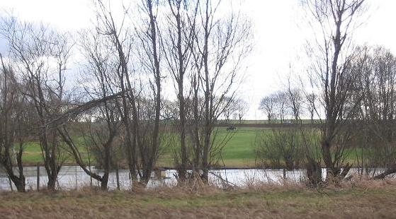 Der Barnim bei Berlin-Lübars, Moorteich am Tegeler Fließ.